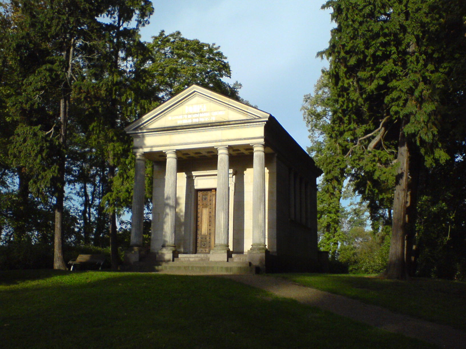 Luisentempel in Neustrelitz